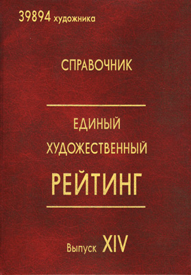 Обложка справочника «Единый художественный рейтинг», вып. XIV